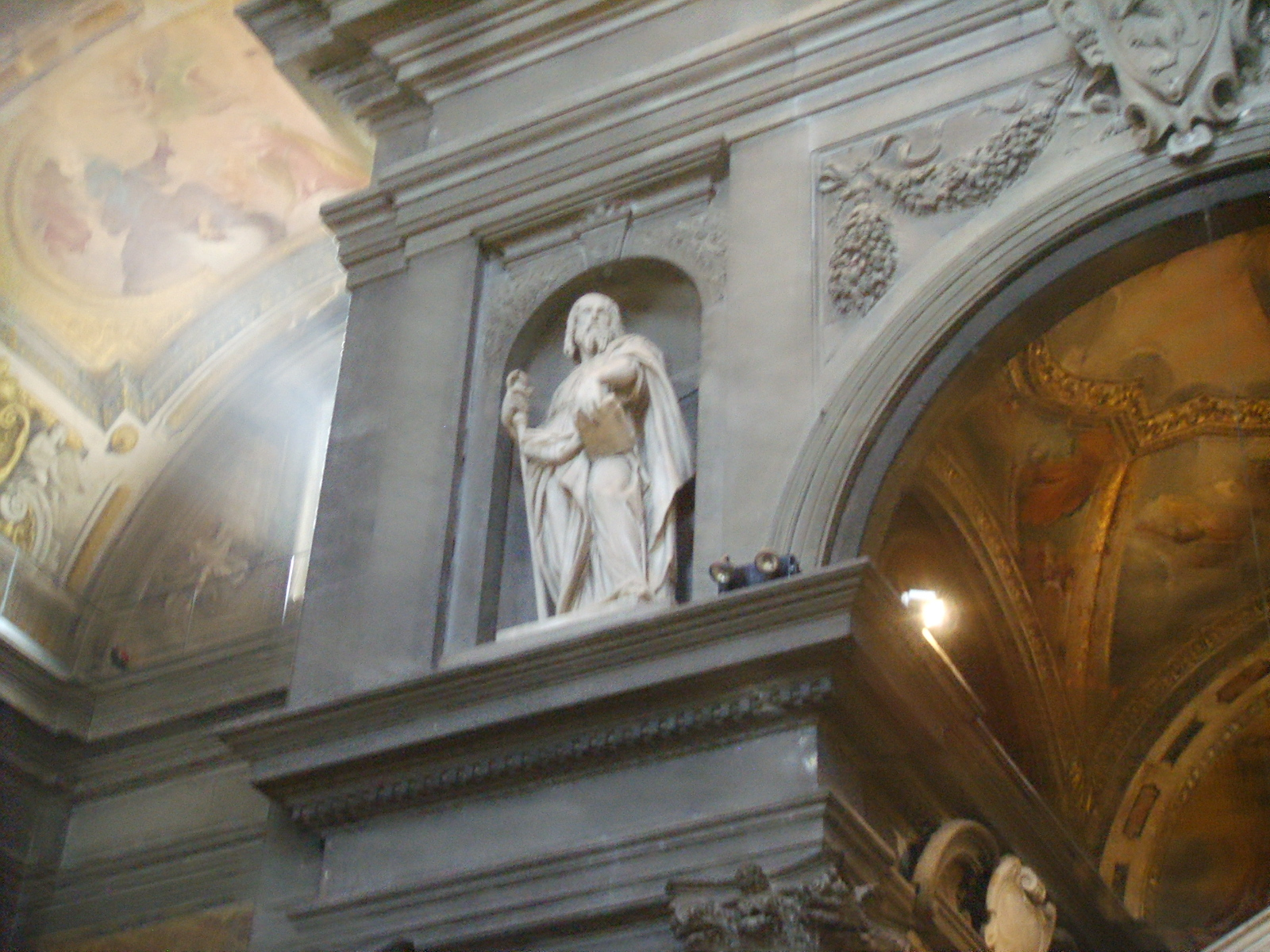 Chiesa di san gaetano, 3right, san filippo, bartolomeo cennini 1658